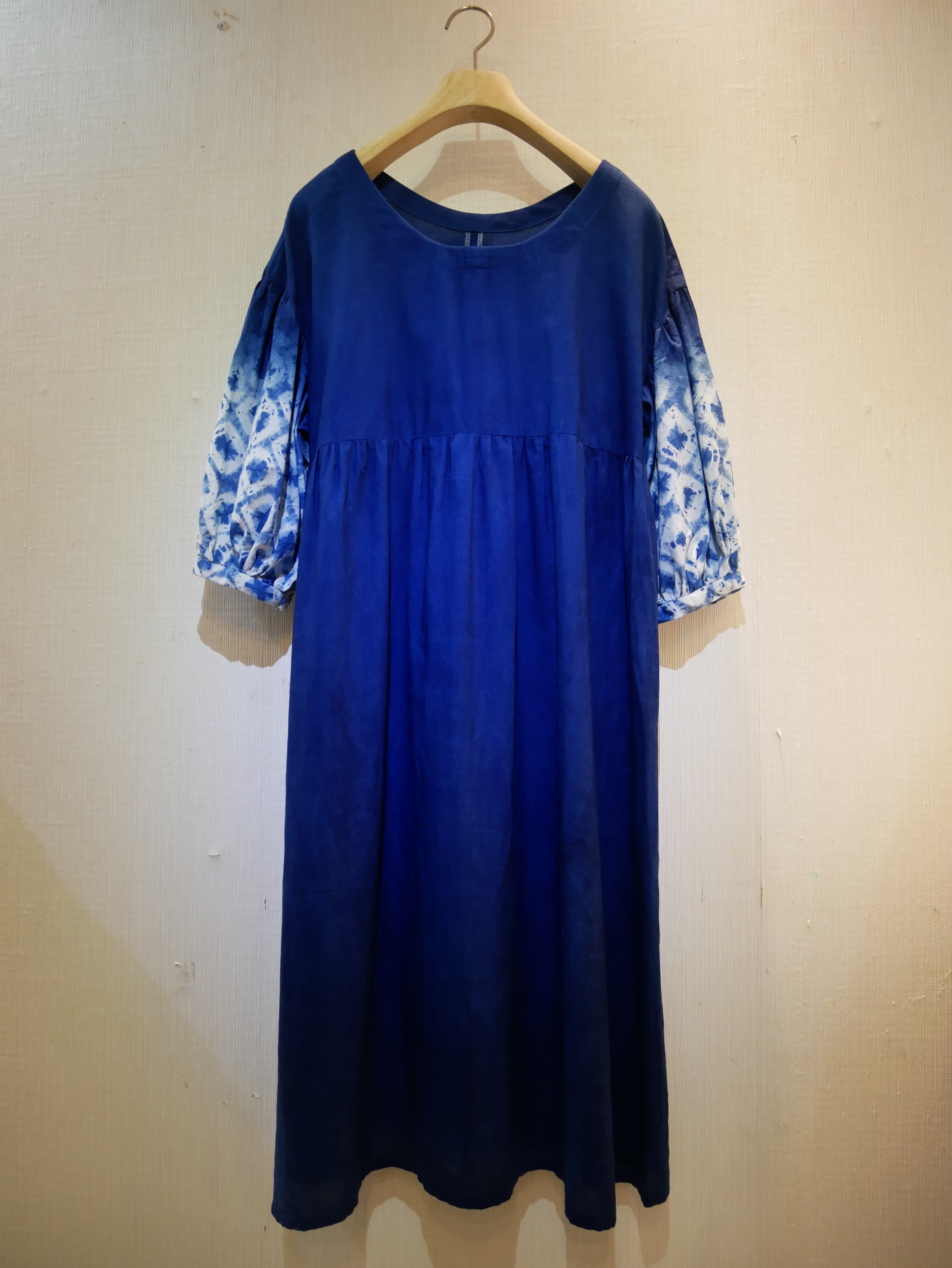 三峽區歷史文物館內所展示「藍與白系列」藍染服飾（2019年），新北市三峽區永館里